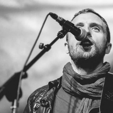 Artur Roman